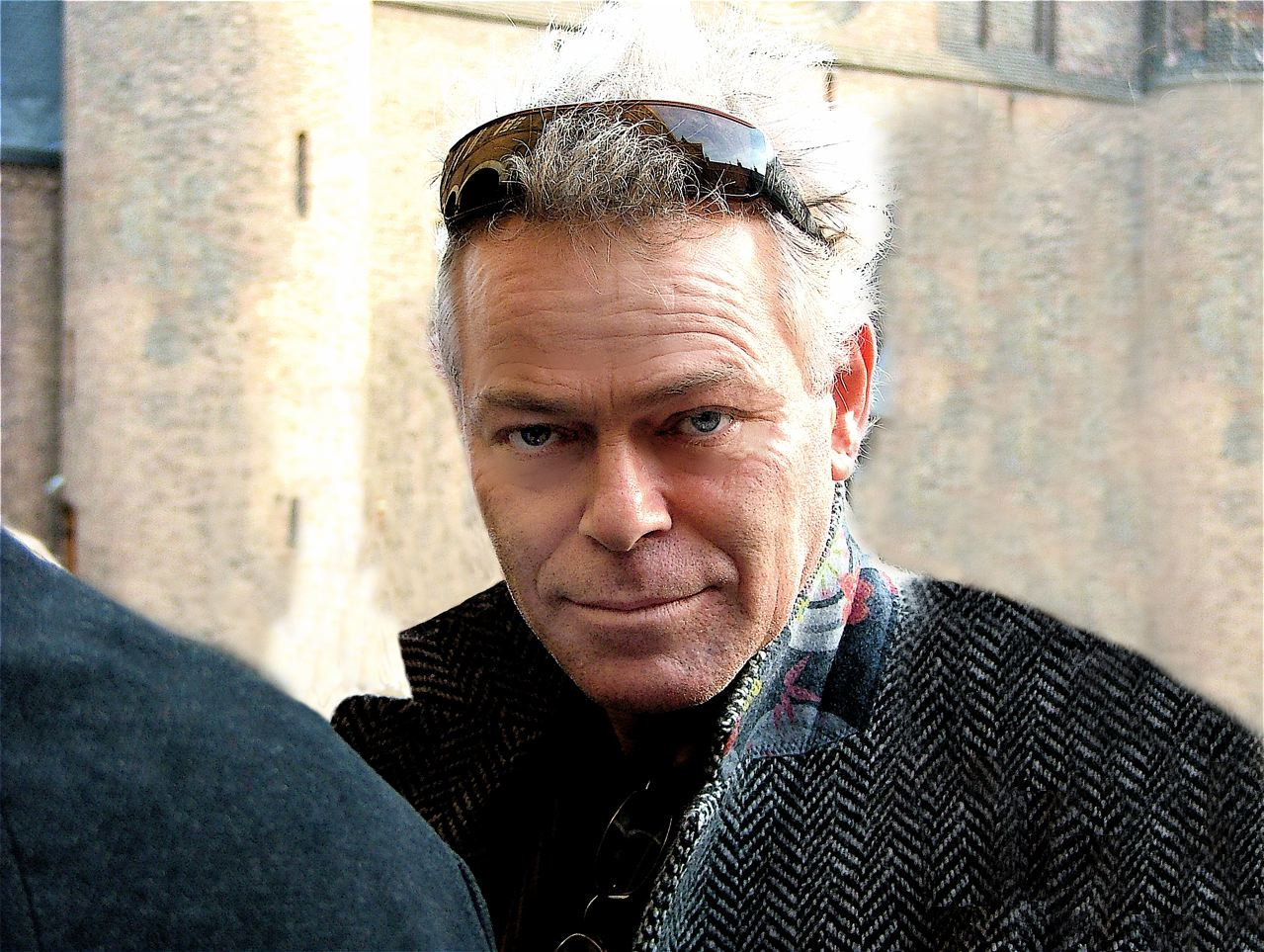 Martin-Bril-volkskrant DenHaag